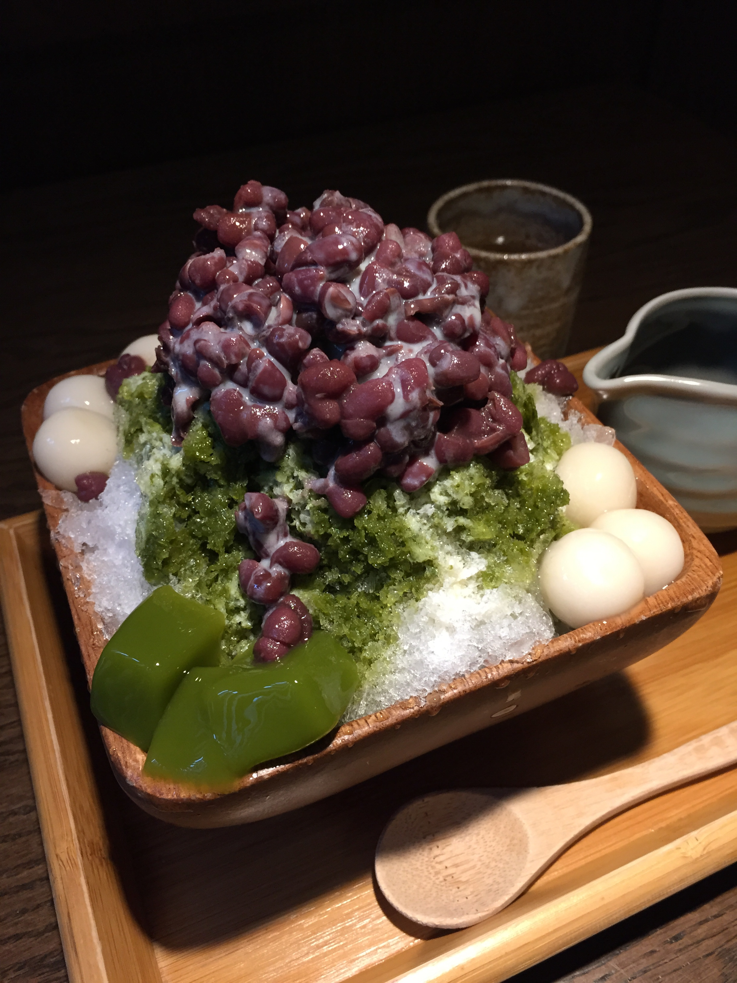 宇治金時, 初心菓寮, 台北